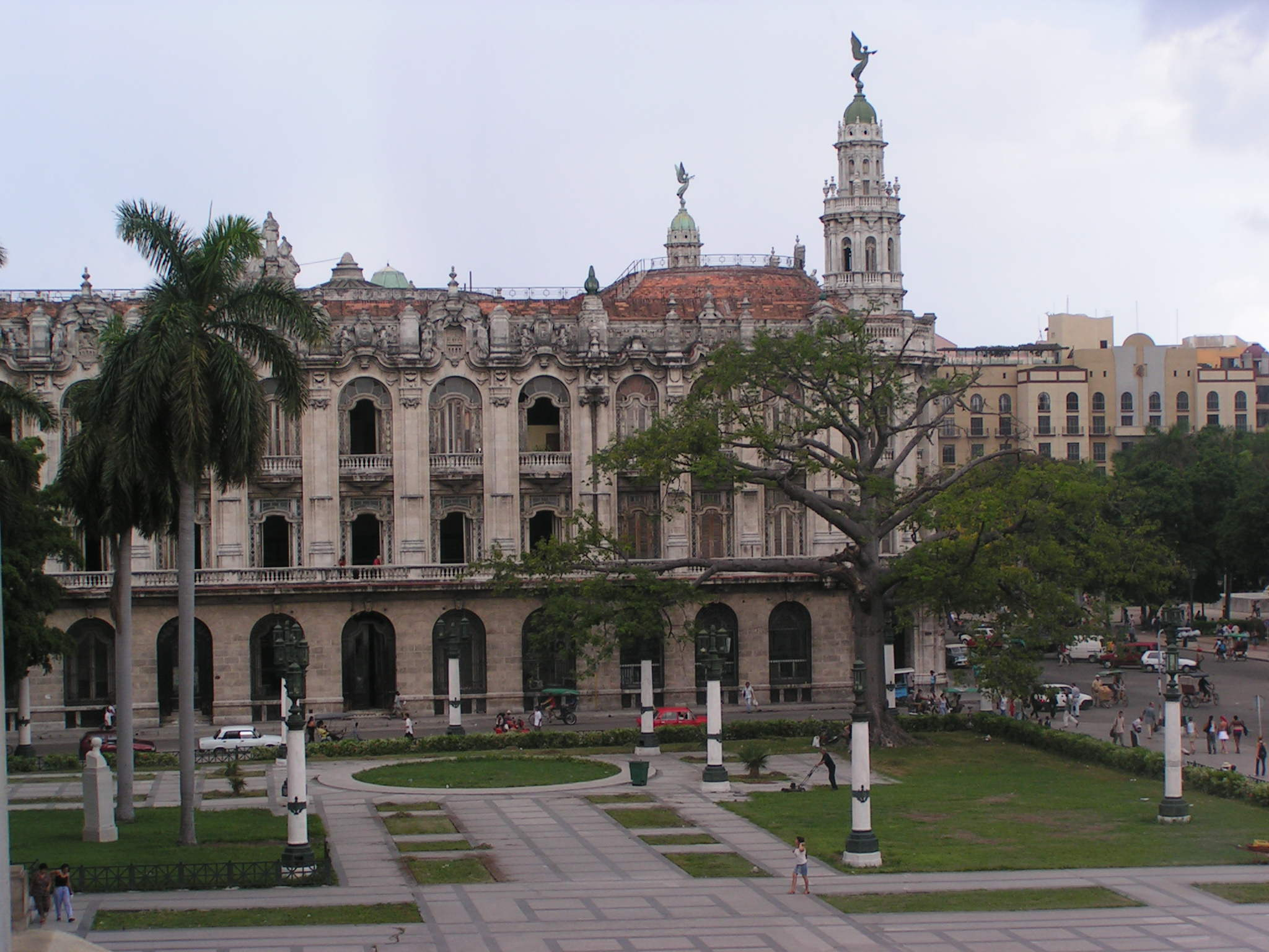 Le Grand Théatre de La Havane, Cuba.